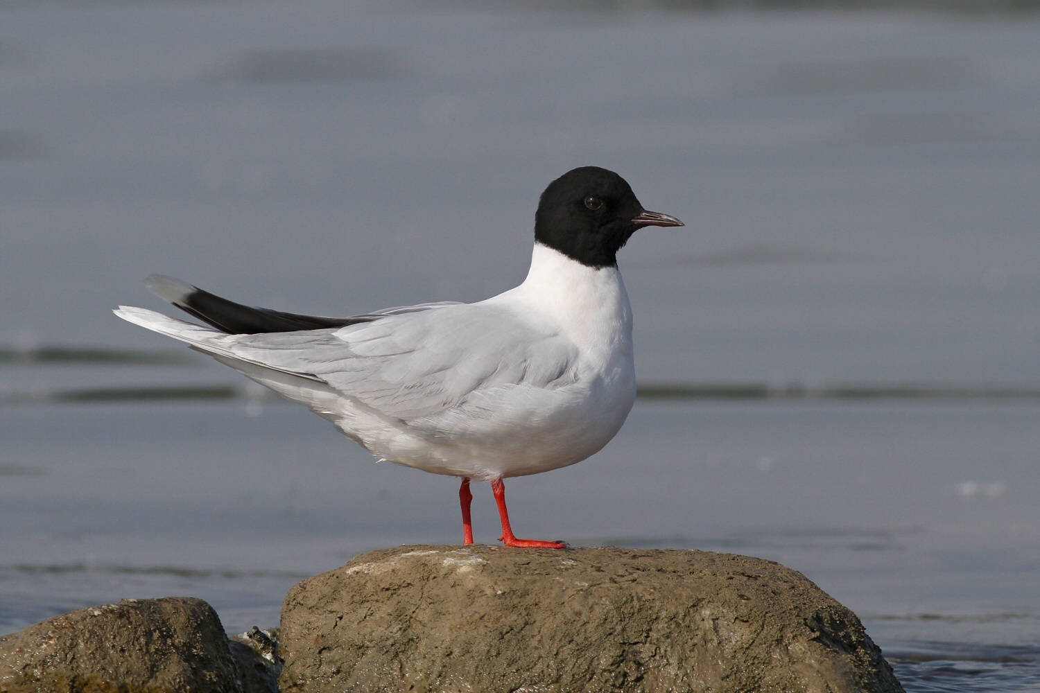 Hrušovská zdrž, Dunaj